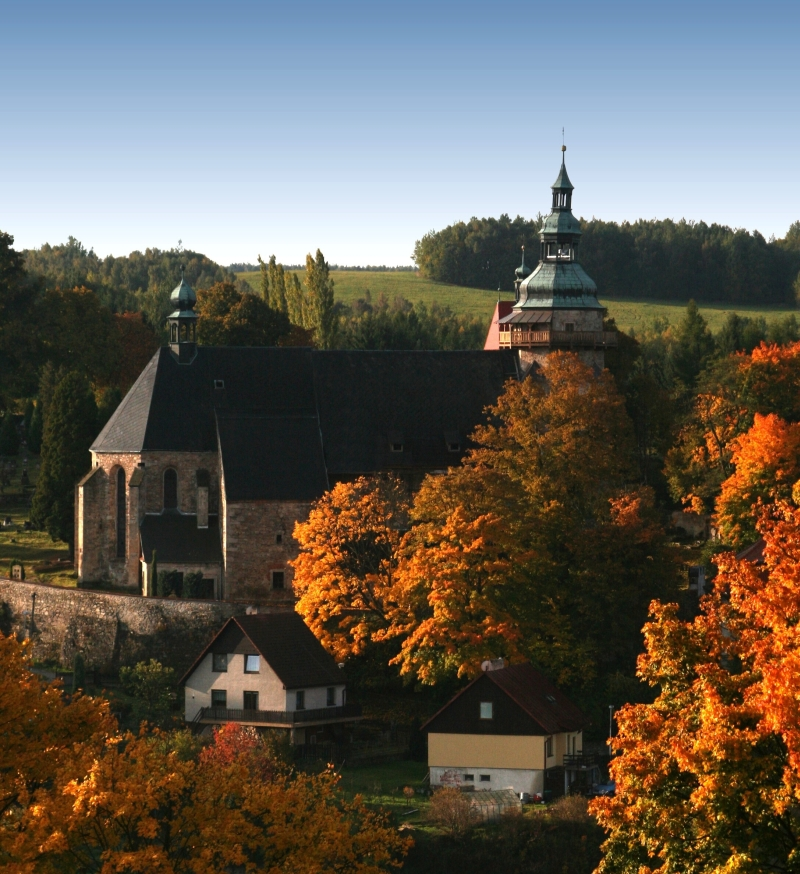 Kostel sv. Jiří